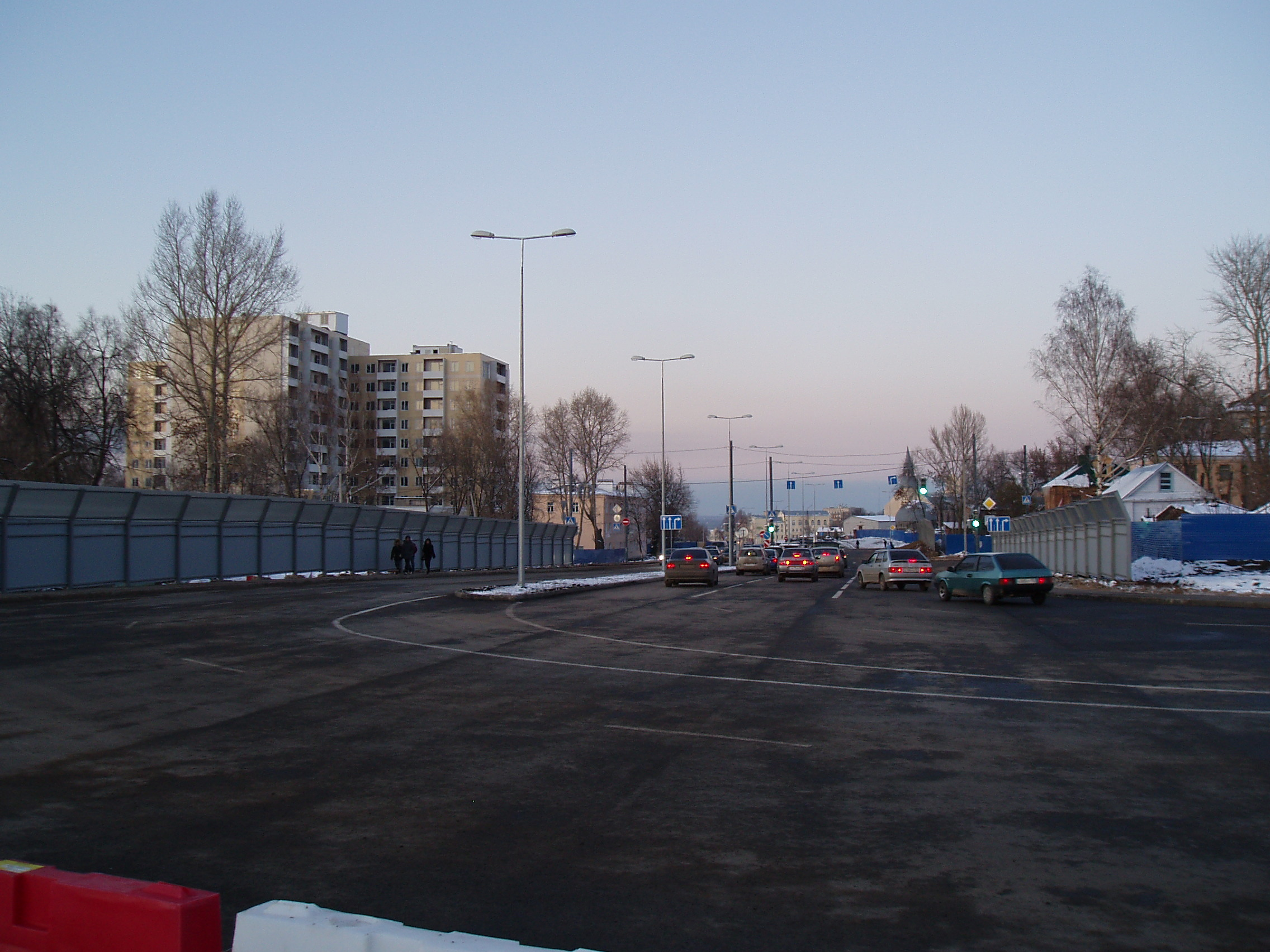 Улица Одесская в день открытия Нижегородского метромоста.